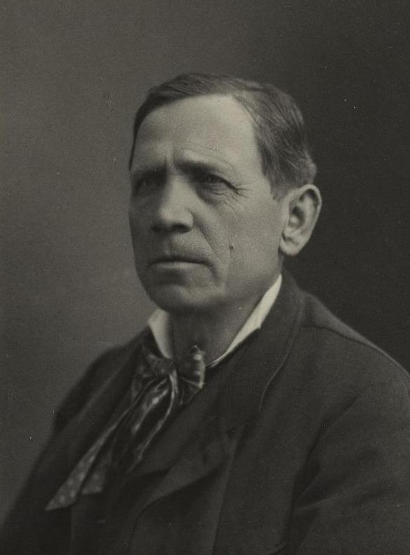 "Ruel (Xavier-François)".